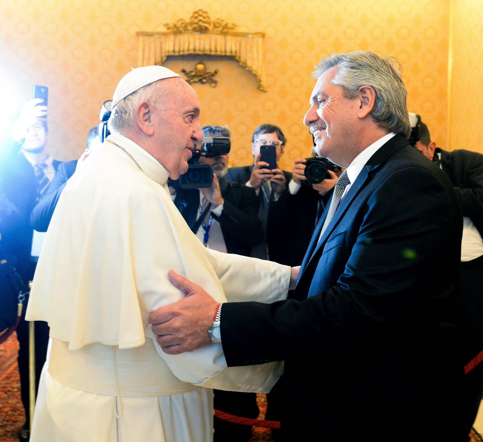 El presidente Alberto Fernández fue recibido hoy en el Vaticano por el papa Francisco, con quien mantuvo un encuentro a solas en la Biblioteca Privada del Pontífice, donde hablaron sobre la situación económica y social de la Argentina.